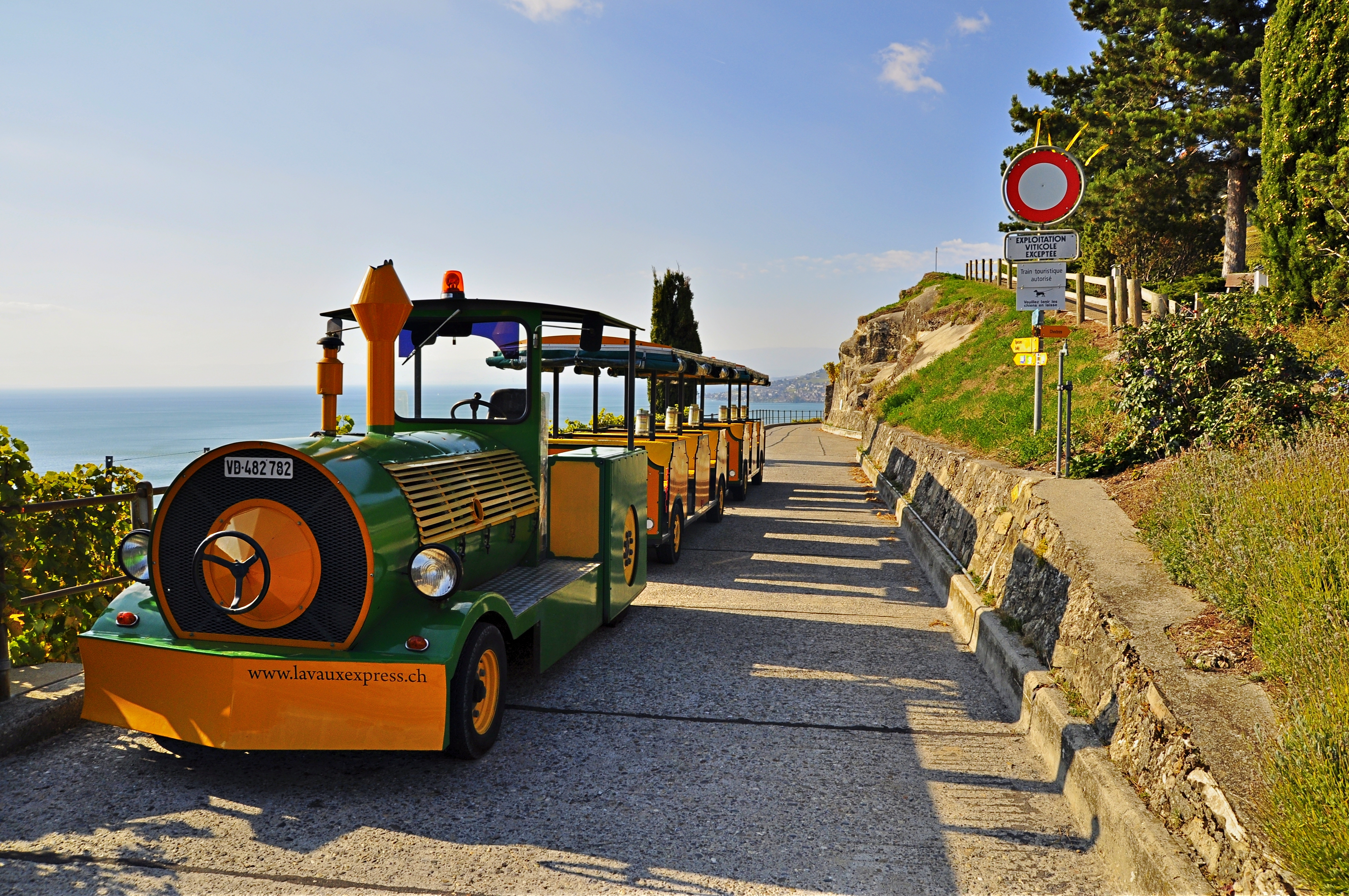 ラヴォー・エクスプレスラヴォー地区 デザレ通り/シュブル, スイス(Chemin du Dezaley/Chexbres,Schweiz)